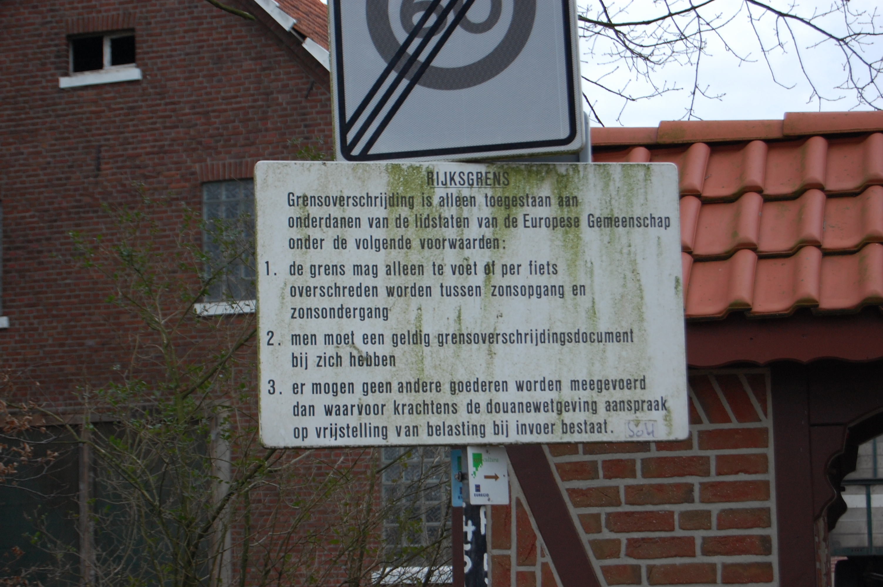 Rijksgrens nabij Kotten (gemeente Winterswijk)